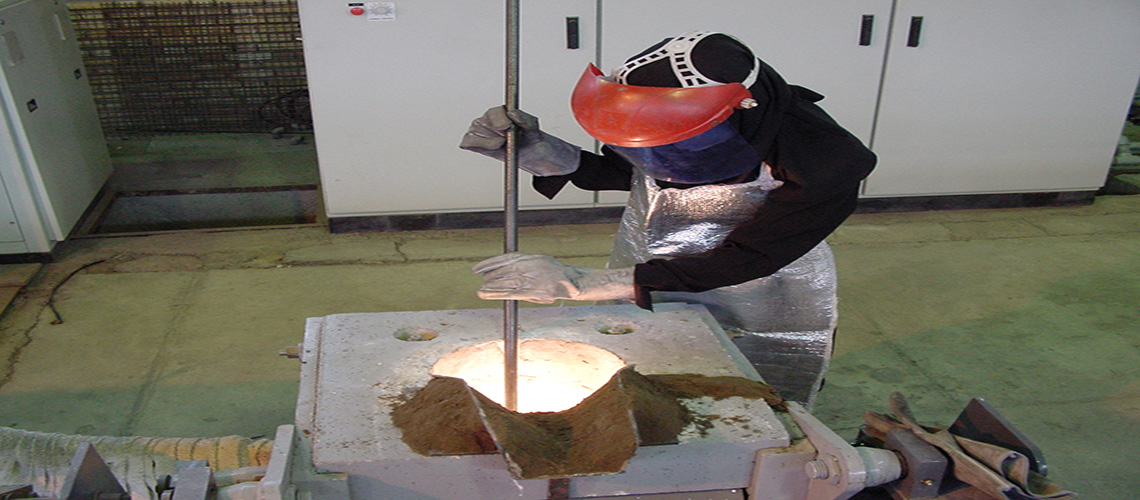 کارگاه ریخته گری دانشگاه شهید رجایی